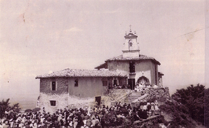 El cura predica desde el púlpito